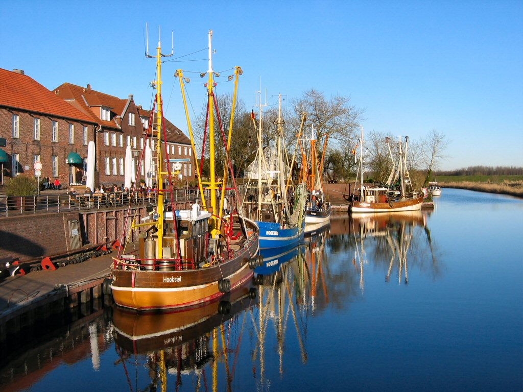 Nordseebad Hooksiel, Alter Hafen